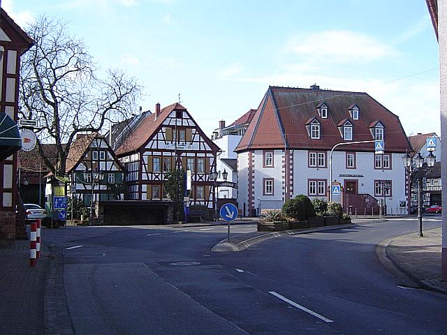 Am Marktplatz von Bruchköbel